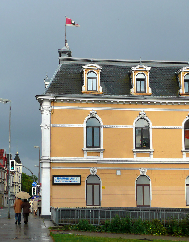 alter Kinokomplex in Hameln im Besitz von Jürgen Rieger 2009 mit NPD Fahne